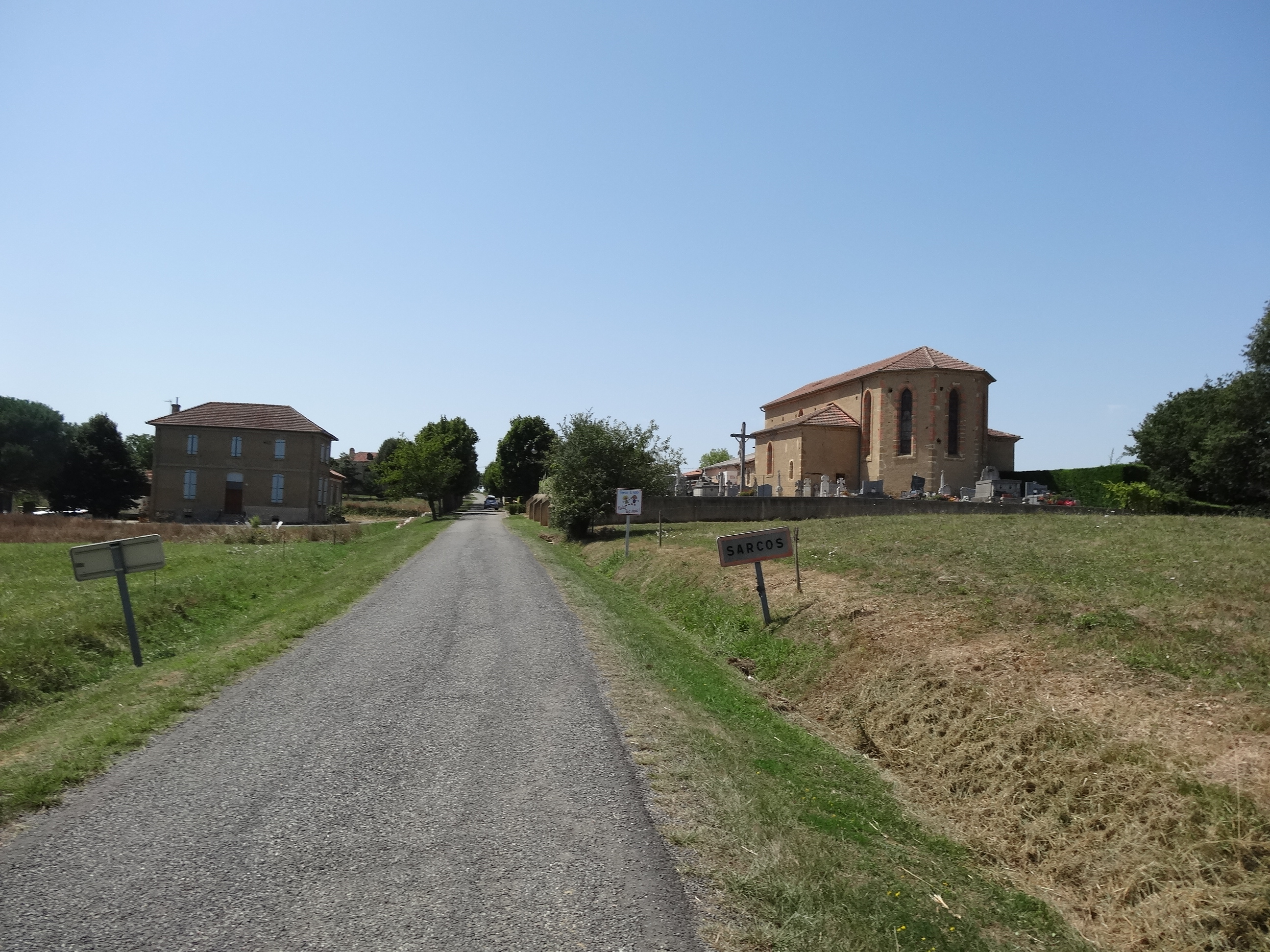 Sarcos en été